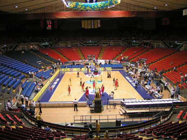 היכל נוקייה - לפני תחילת דרבי האליפות של 2004, שימו לב לבלונים למעלה.